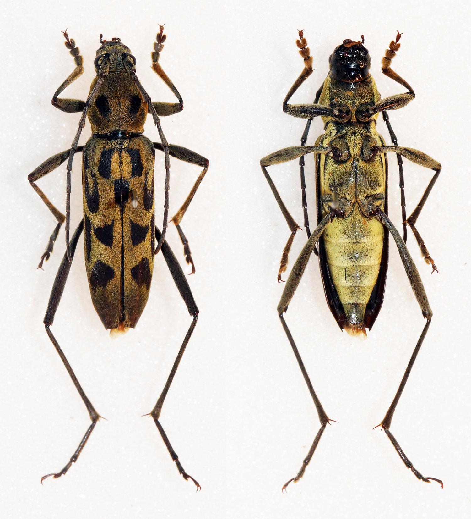 Pascoe,1862 Sex: Female Data: 15-06-14 - Mt Daoshan 1200m - Linxiang - Pingban - Guangxi - China Size: 17.5mm